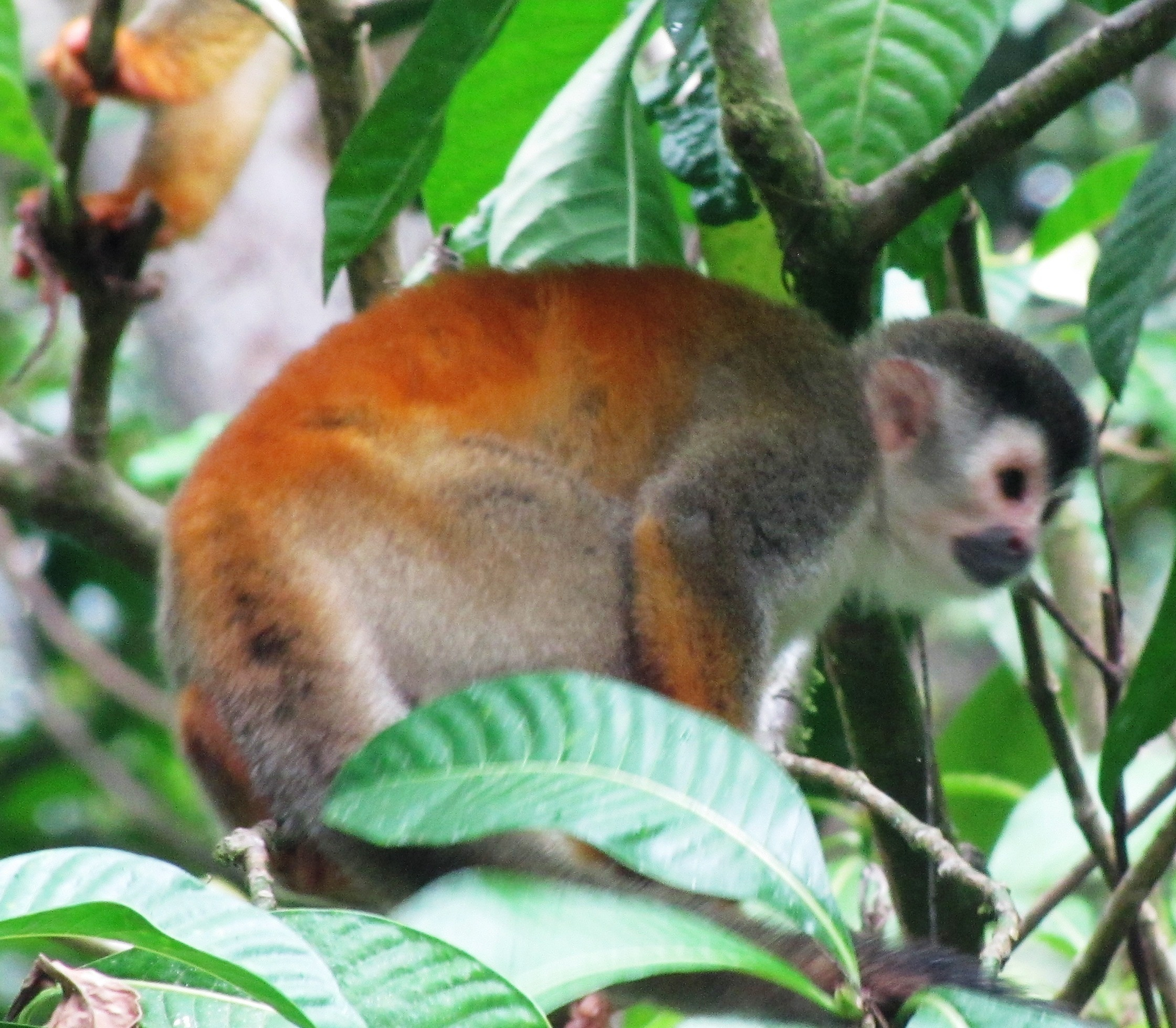 Mono Titi, símbolo del Parque Nacional Manuel Antonio en Costa Rica y uno de los monos más pequeños del mundo.